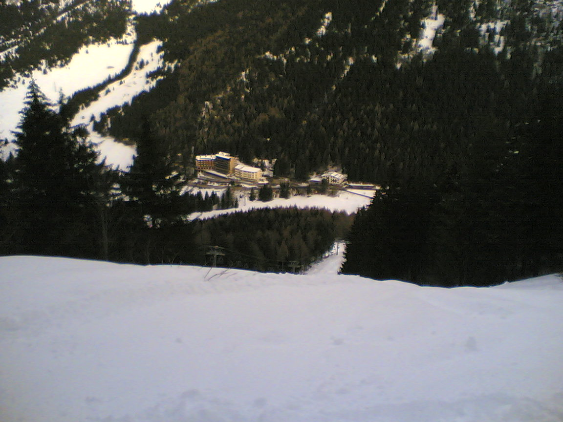 Le strutture del Passo dal Monte Scanapà